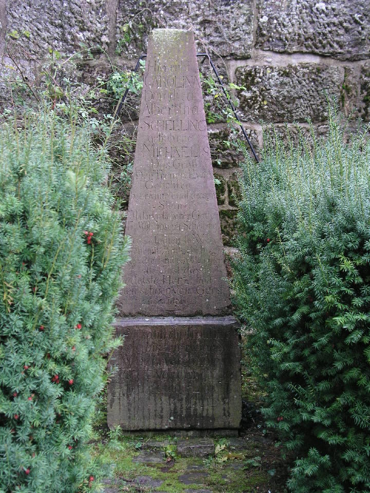 Caroline Schelling wurde auf dem Friedhof hinter der Kirche des Klosters Maulbronn beigesetzt. Ein Obelisk erinnert dort an sie mit der Inschrift: „Ruhe sanft, du fromme Seele, bis zur ewigen Wiedervereinigung. Gott, vor dem du bist, lohne in dir die Liebe und Treue, die stärker ist als der Tod.“